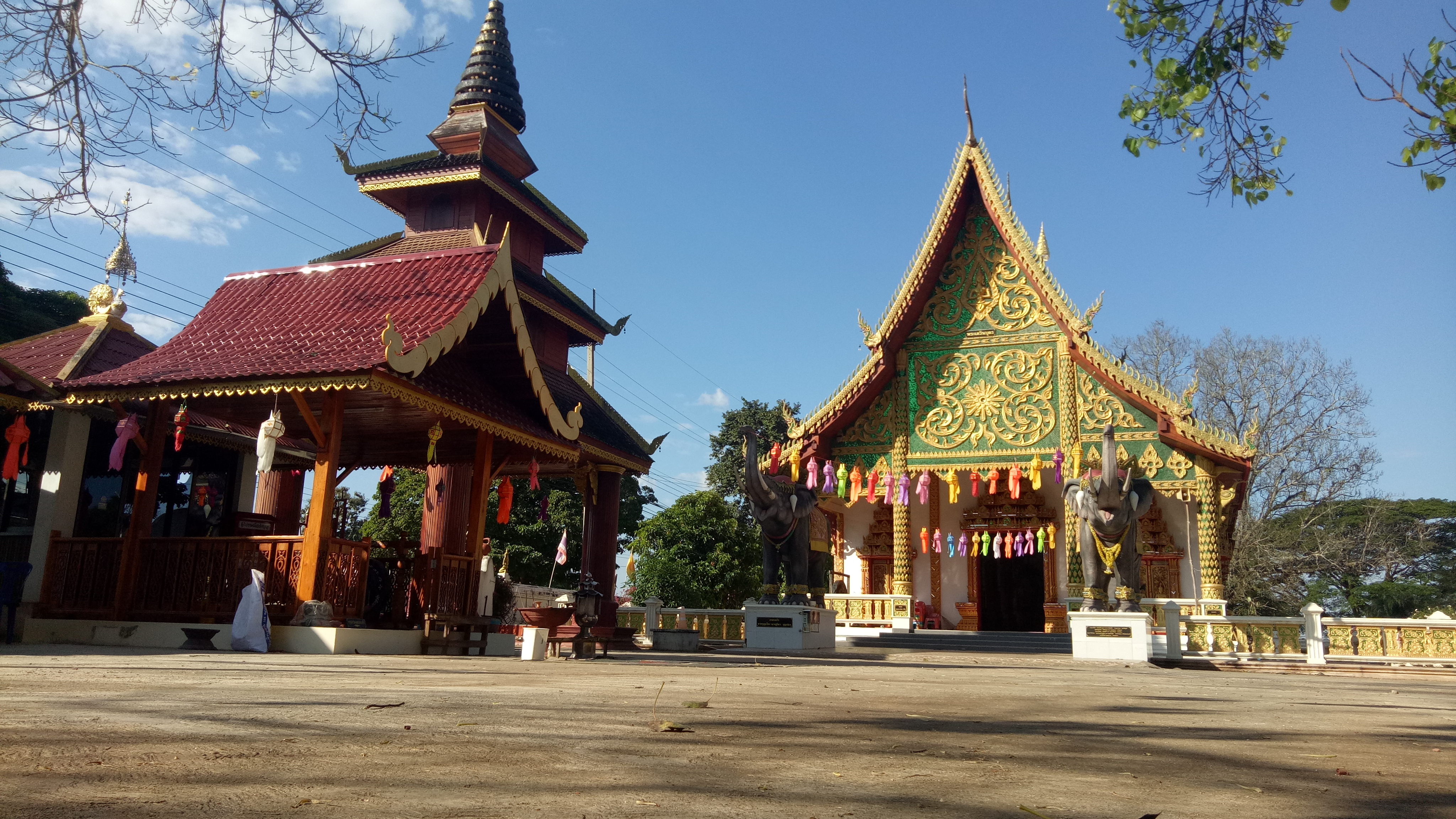 ได้มีการพัฒนาสิ่งปลูกสร้างต่างๆ